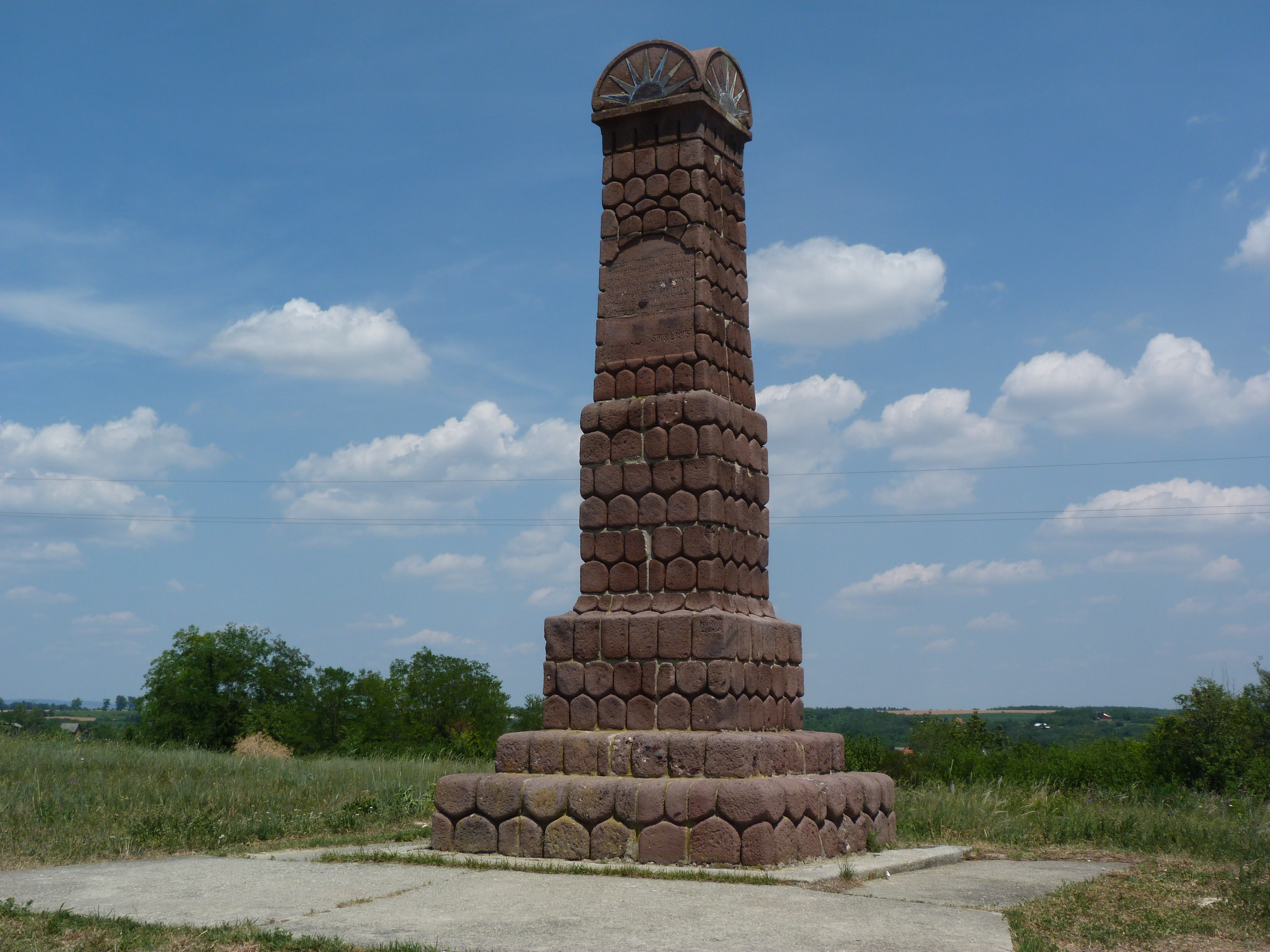 A felvételek 2012. junius 24 –én, vasárnap készültek Balatonkenesén, a Soós hegyen. Soós Lajos (1856-1902) Balatonkenesei költő. 1927 –ben, vörös mészkőből emelt emlékoszlopa a balatonkenesei löszpart legmagasabb pontján áll. Róla nevezték el magát a helyet is Soós hegynek. Soós Lajos a pápai ref. kollégium önképzőkörében kezdett verseket írni. Műveiben sokszor megjelenik a Balaton, gyakran látogatta ugyanis Kenesére áttelepült édesanyját. A tragikus sorsú költőt kívánsága szerint Balatonkenesén temették el. Az emlékmű felirata: 'Szép Balaton én csak hozzád vágyok Ringasson el a Te habos ágyod. Itt boruljon rám az örök éjjel, Te takarj be bársonyos fövénnyel, Te suttogd el hajnali szellőnek, Alkonyattal vándorló felhőnek, Csillagos ég hulló harmatának: Mért szaggatta e szívet - a bánat.' GPS koordináták: 10 / 10